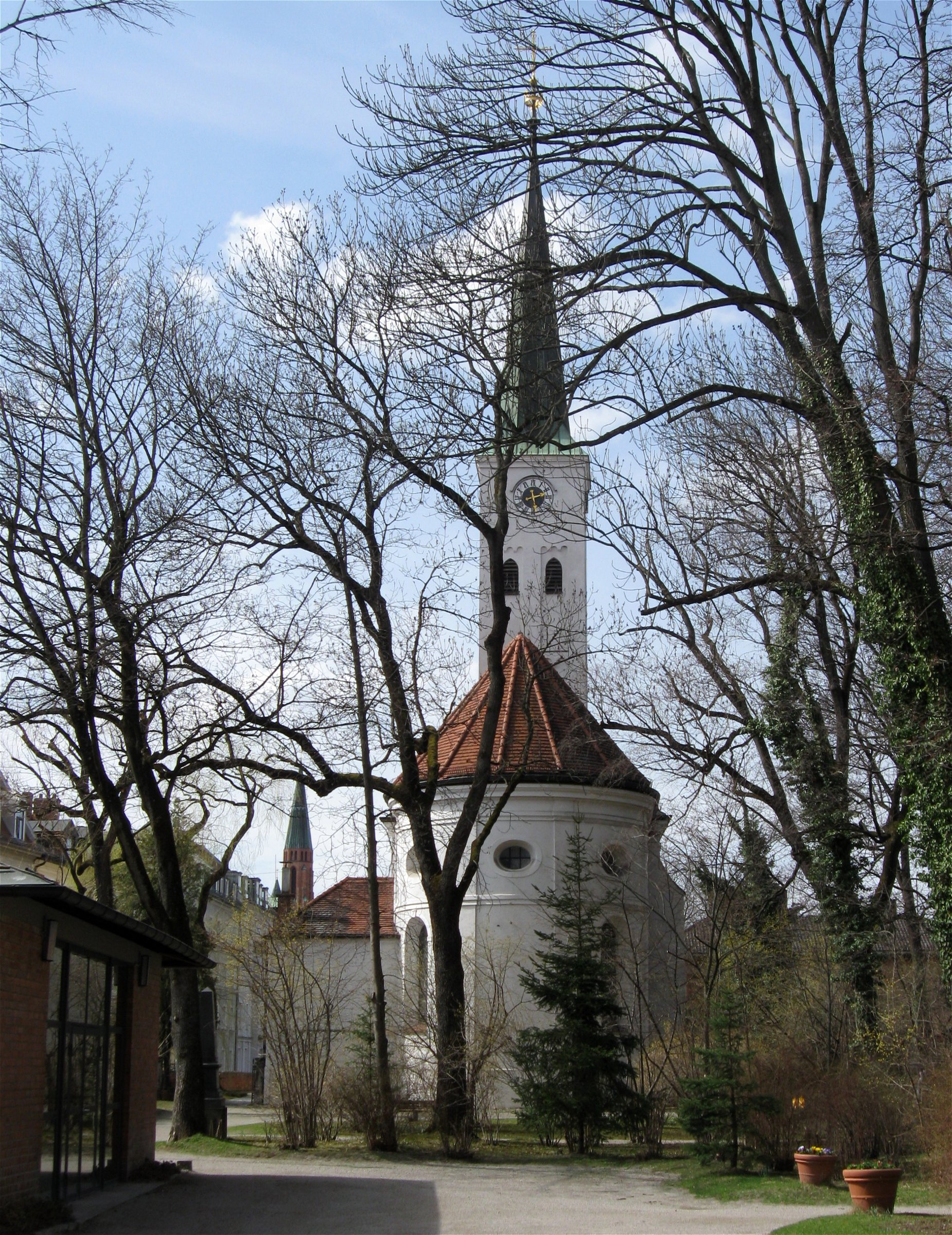 Kirchenstraße 39; Alte Kath. Pfarrkirche St. Johann Baptist, einschiffiger barocker Saalraum mit eingezogenem Chor, Westturm und Grabdenkmäler an der Außenseite, im Kern romanisch, 1493 spätgotisch verändert, 1698-1700 Umbau, 1712 Turm nach Brand erneuert, Spitzhelm 1864; mit Ausstattung; Friedhof, ältester Teil erstmals 1315 erwähnt, im 19./20. Jh. mehrfach nach Norden erweitert; Friedhofsmauer, rohbacksteinerne Umfassungsmauer mit ostseitigem Torbogen und Freitreppenanlage vor der Kirche, Treppenanlage 1776, Mauer 2. Hälfte 19. Jh.